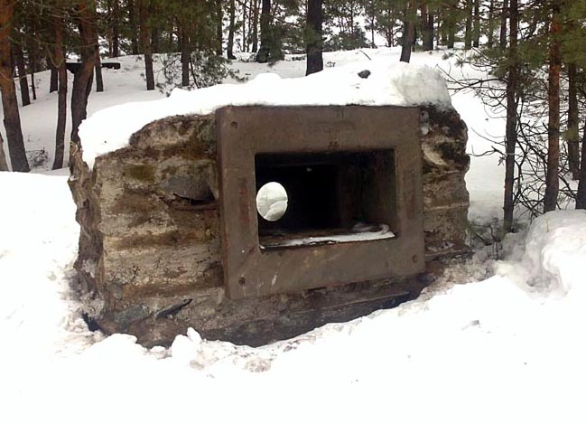 Финская Дерево-Земляная Огневая Точка для казематного орудия 45к40.